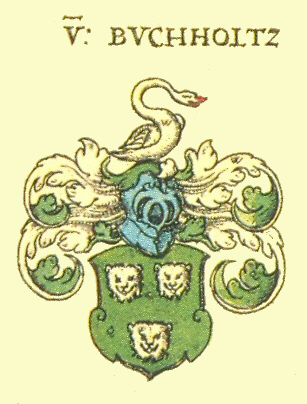 Wappen der Rheinländischen und Märkischen Adelsfamilie Bocholtz